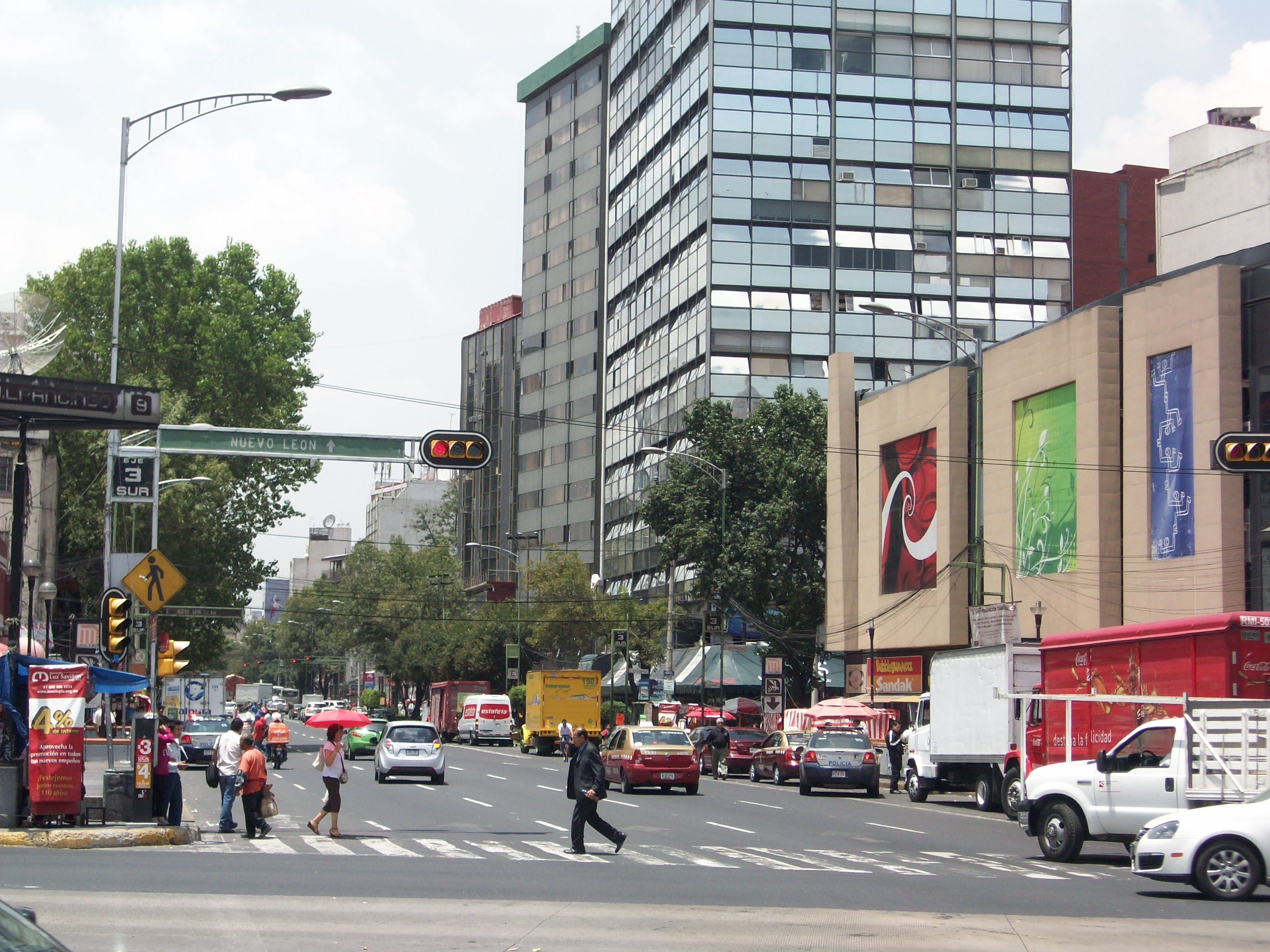 Avenida Baja California Eje 3 sur